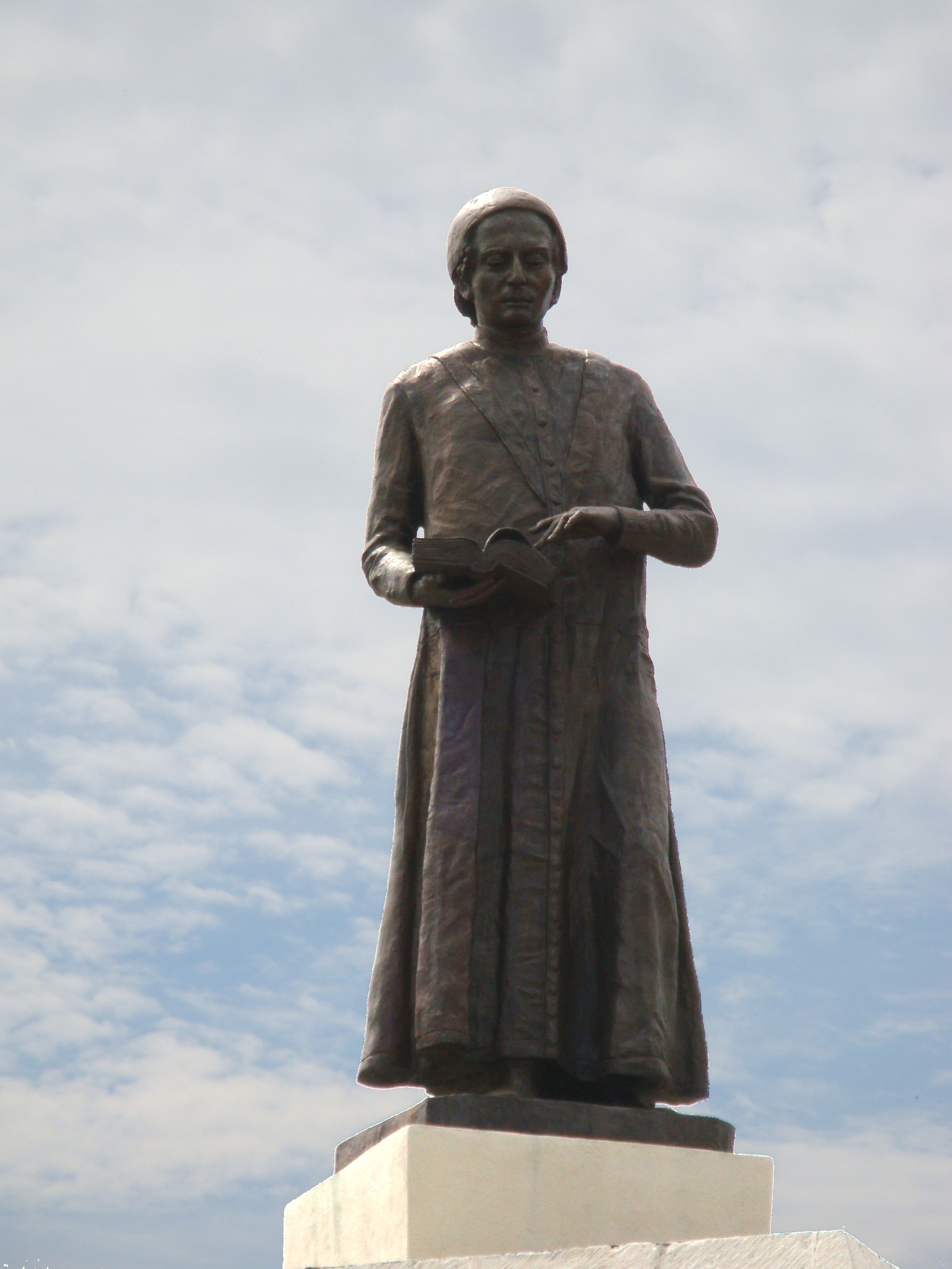 Estatua de José Eduardo de Cárdenas. Presbítero tabasqueño, representante de Tabasco ante las Cortes de Cadiz en 1811 y fundador de la ciudad de Heroica Cárdenas, Tabasco, México.